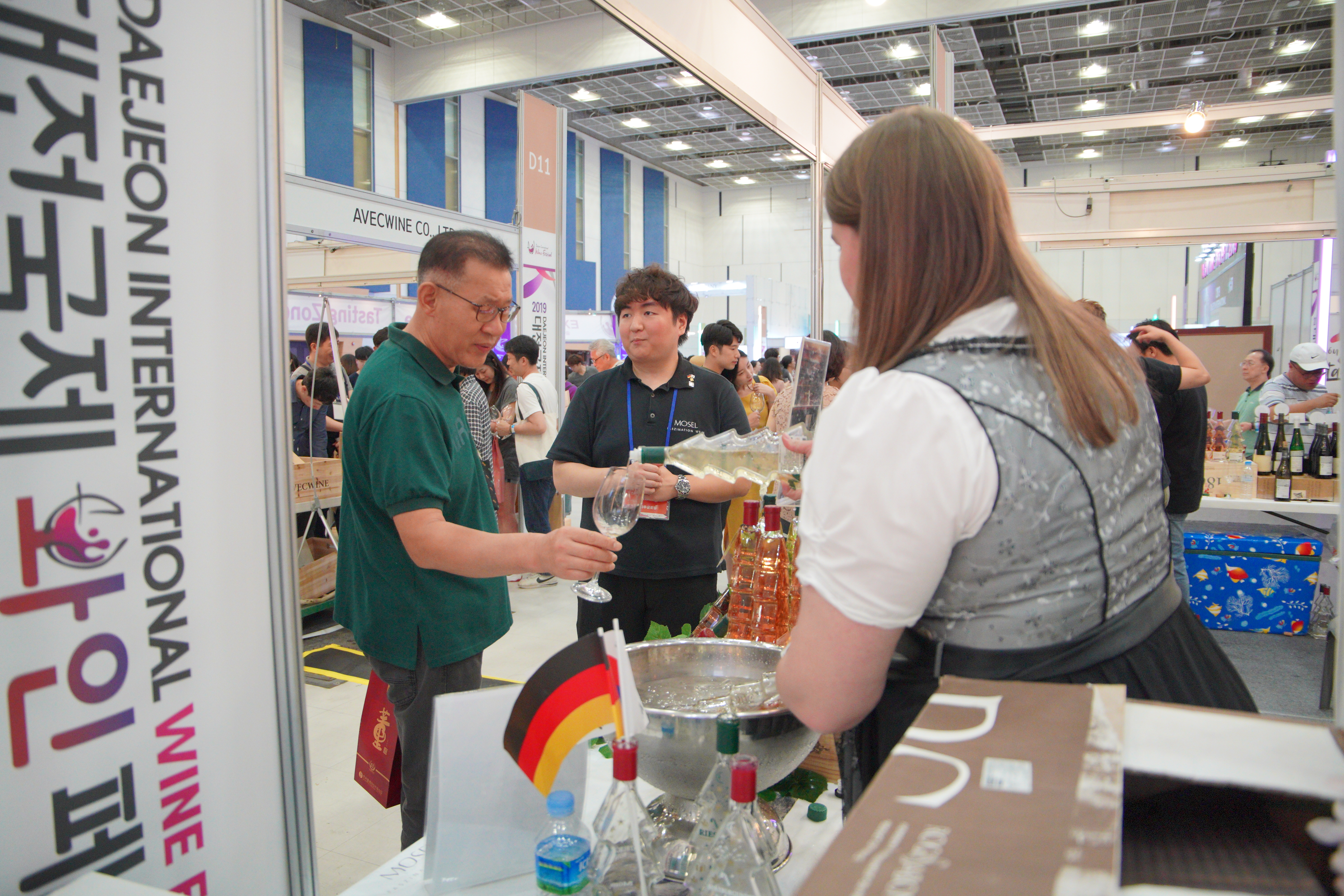 2019 대전국제와인페스티벌 (46)